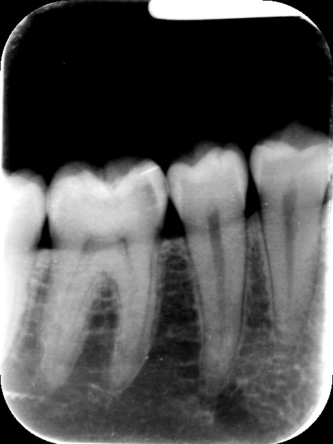 Esempio di radiografia endorale digitale di una regione dentale